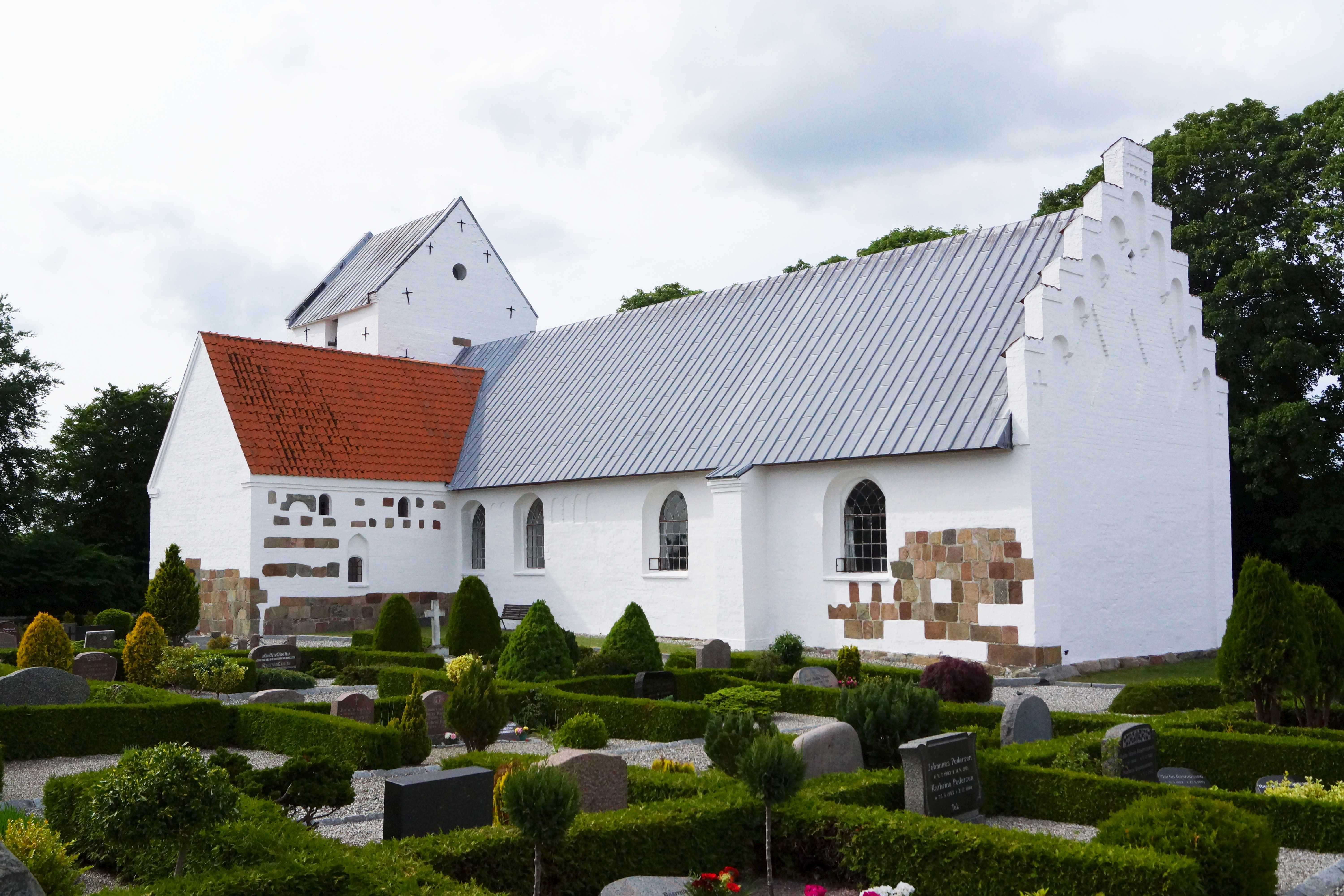 Nødager Kirke Total fra øst